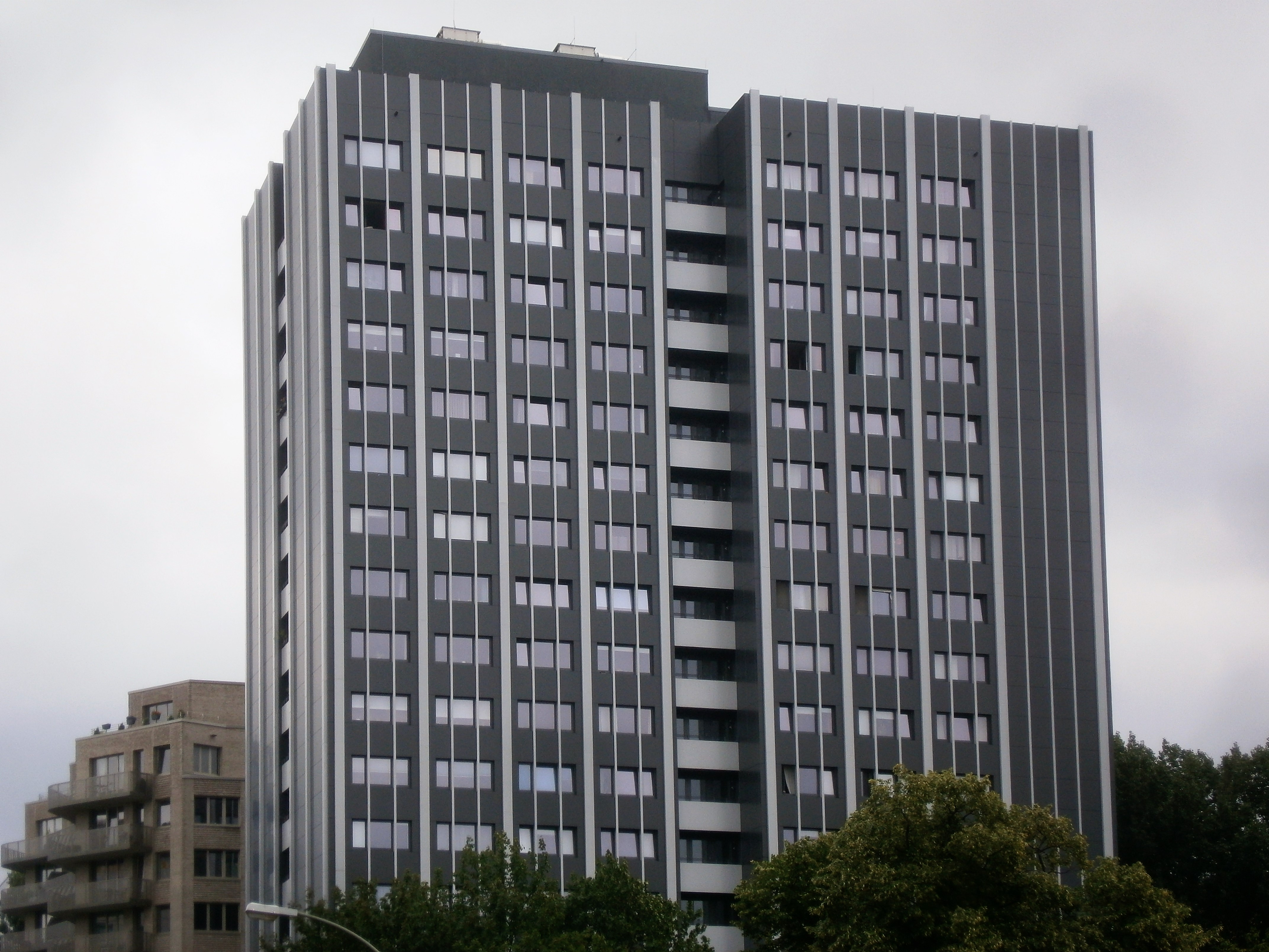 Die Andreasstraße ist eine Straße im Berliner Bezirk Friedrichshain-Kreuzberg, Ortsteil Friedrichshain. Angelegt wurde sie 1862 auf vorherigen Gartenland und 1863 benannt. Bis um 1900 waren die Grundstücke bebaut und bis 1930 wurde verdichtet. Bei Luftangriffen im Zweiten Weltkrieg wurde die Gebäude schwer getroffen. So ist die Straße seit den 1950er Jahren mit wiederhergestellten Altbauten, aber besondres durch Plattenbau-Wohnblöcke aber seit 1990 auch durch Hotel- und Bürobauten im Umfeld des Ostbahnhofs charakterieisiert. Das Bild zeigt: Das Mitte der 2010er Jahre sanierte 18-geschossige Doppel-Wohnhochhaus Andreasstraße 22 an der Südostecke Singerstraße (eigentlich auf Grundstück Singerstraße 30, 31 stehend).